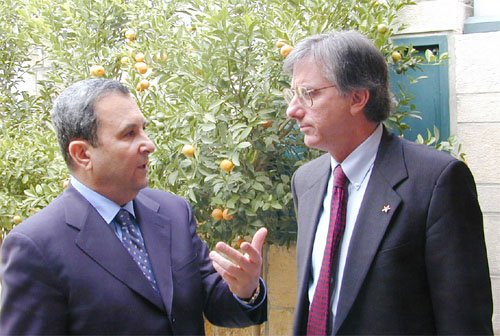 Prime Minister Ehud Barak and SMEC Dennis Ross Location: Jerusalem